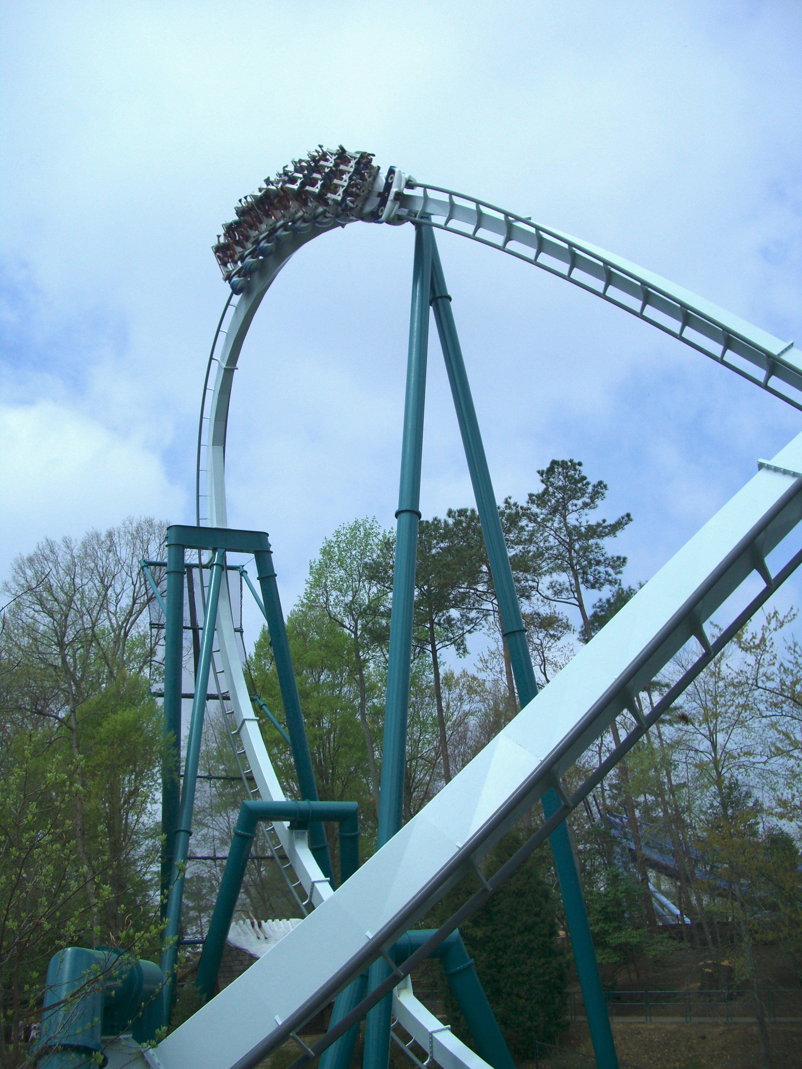 Alpengeist , montagnes russes à Busch Gardens Europe